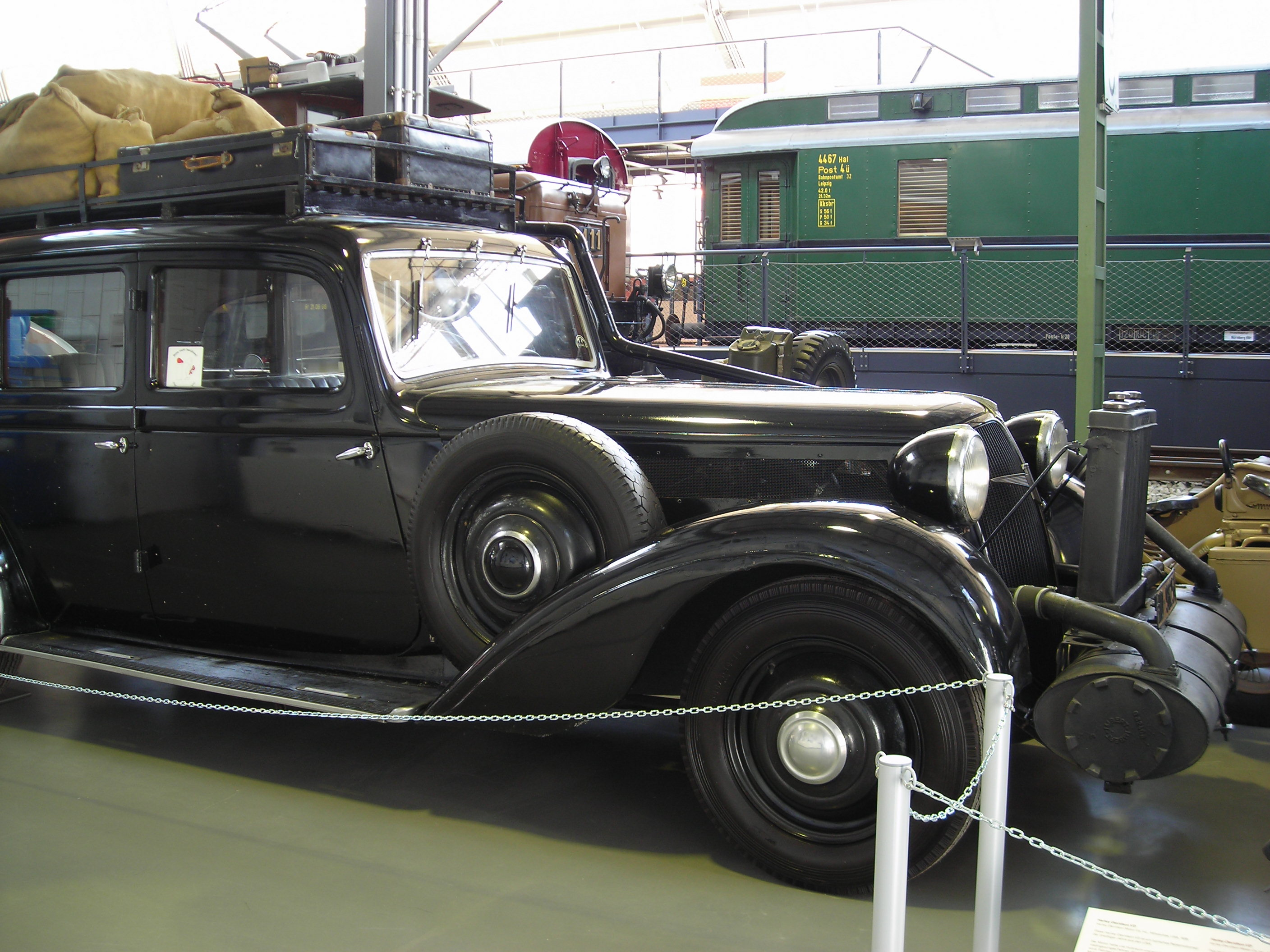 Adler Diplomat 3 GS mit Holzgasgenerator - Adlerwerke, Frankfurt am Main 1938, 1941 aufgrund Benzinknappheit mit Imbert-Ofen versehen, Antrieb über Kohlenmonoxyd und Wasserstoff, 6-Zylinder-Viertaktmotor in Reihe (Leistung bei Gasbetrieb: 2914 cm³, 26 kW (36 PS), ca. 70 km/h), Exponat im Deutschen Museum Verkehrszentrum, Halle II, Inv.-Nr. 1984-0601